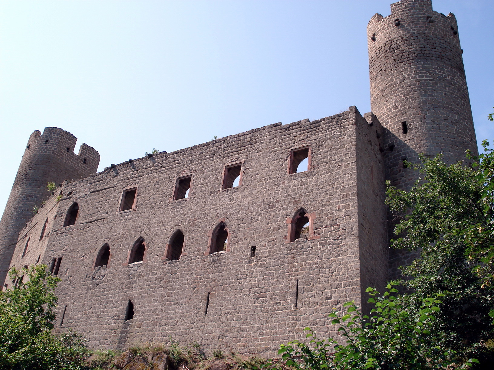 Château ruiné de Haut-Andlau, près de Barr, Bas-Rhin, France